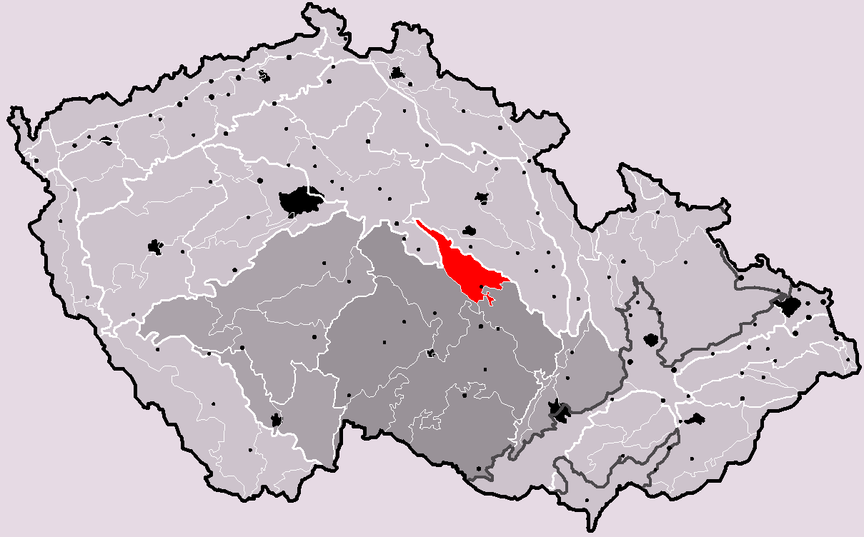 Poloha geomorfologického celku Železné hory v rámci České republiky. Zatímco na jihozápadní a severovýchodní straně je hranice Železných hor vcelku nesporná, při vymezení okraje jihovýchodního se vyskytují odlišné pohledy (viz podrobnější mapka níže). Hercynský systém Hercynská pohoří I Česká vysočina I2 (II) Česko-moravská subprovincie I2C (IIC) Českomoravská vrchovina I2C-3 (IIC-3) Železné hory